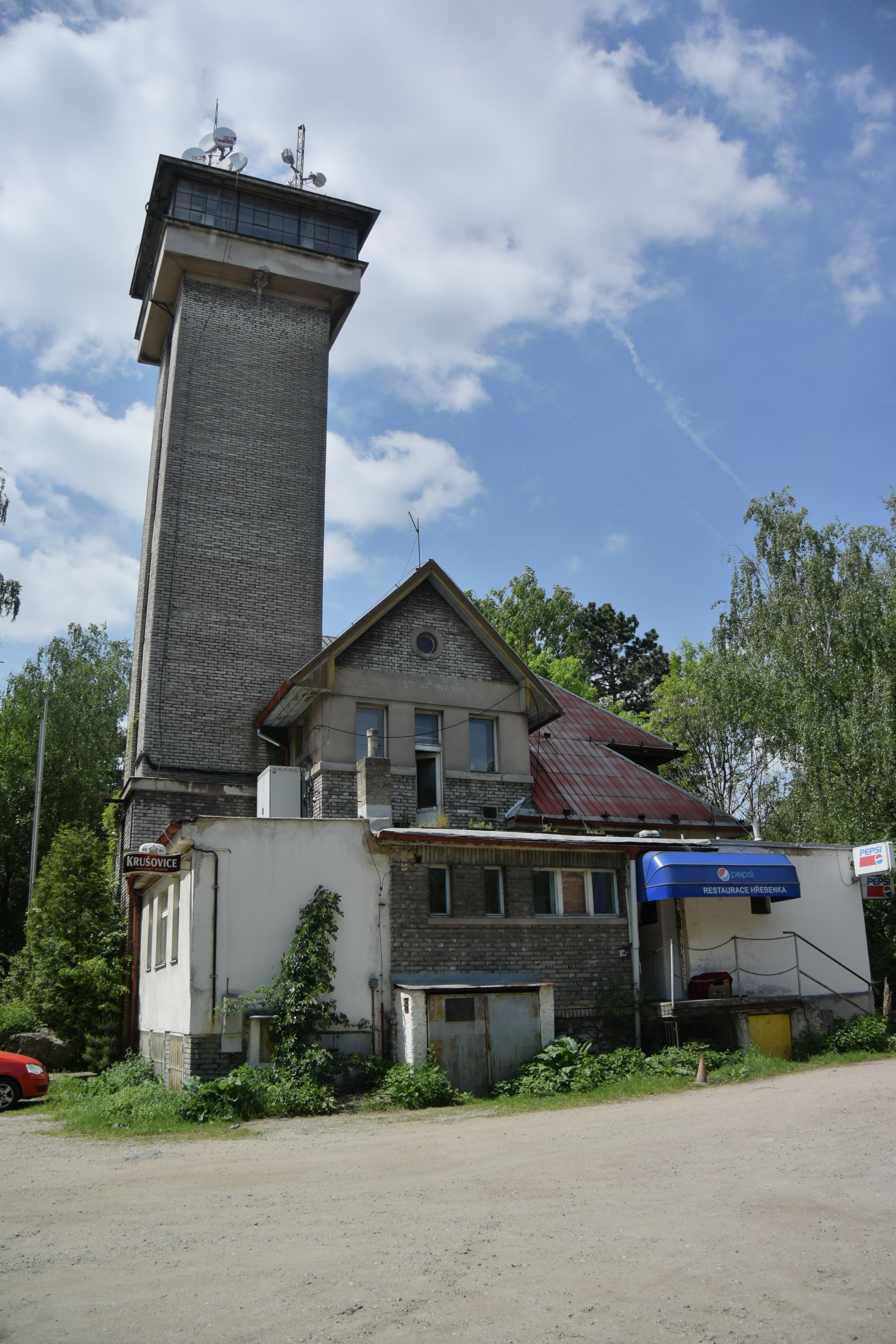 Ze dne 23.5.2015